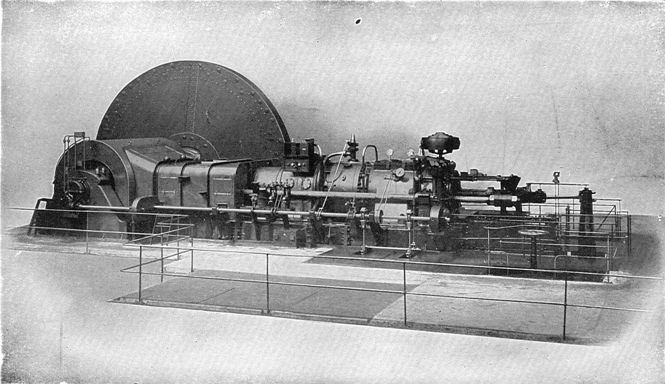 Oechelhauser engine, Beardmore, Glasgow (Rankin Kennedy, Modern Engines, Vol III).jpg